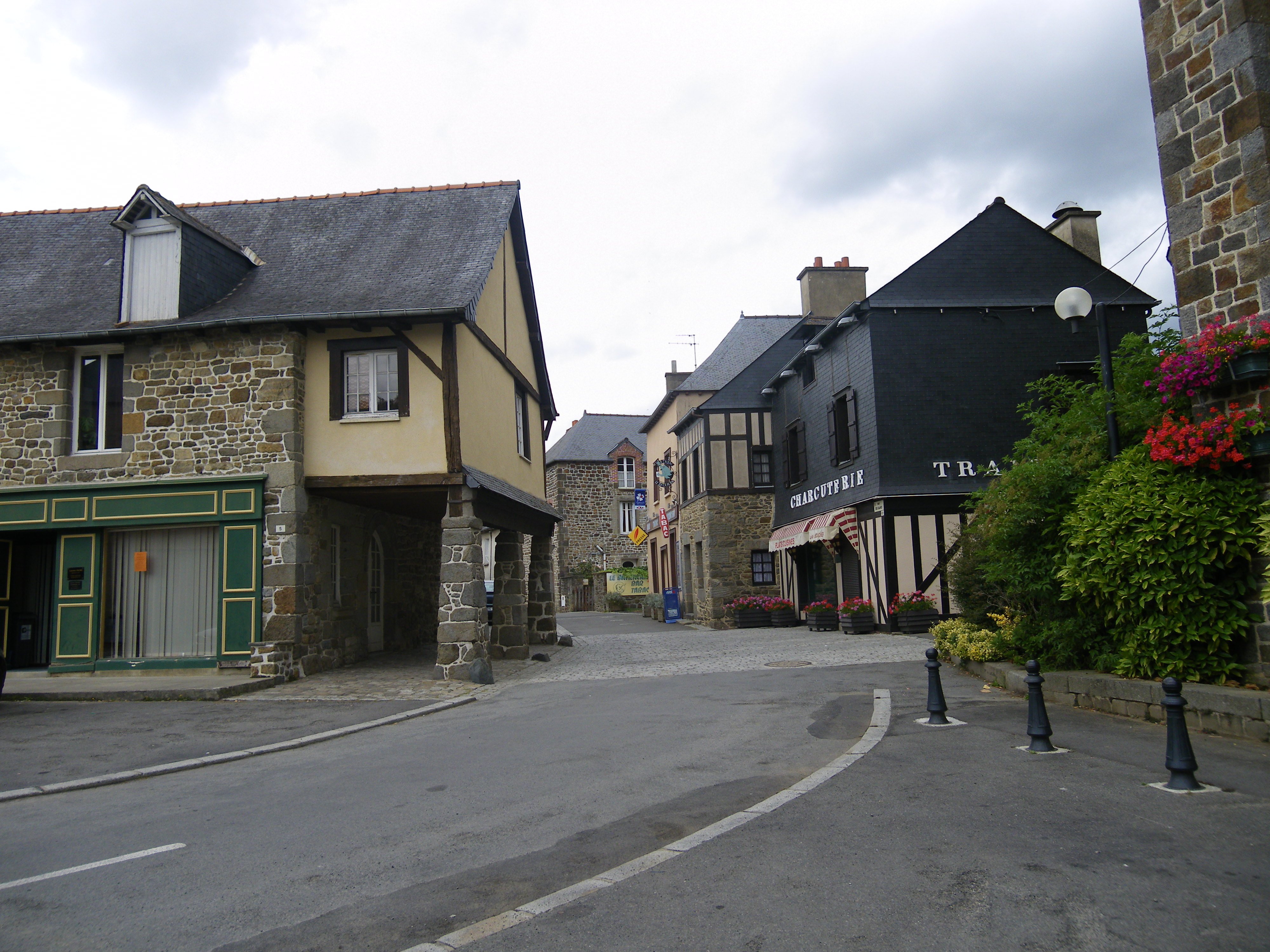 maisons anciennes a tinteniac